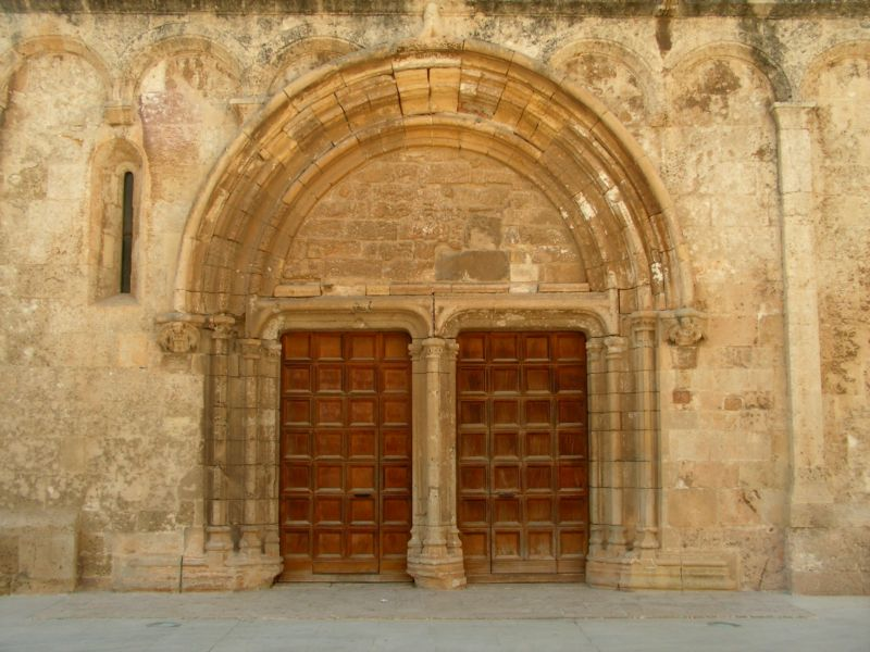 Basilica di San Gavino a Porto Torrese (provincia di Sassari)